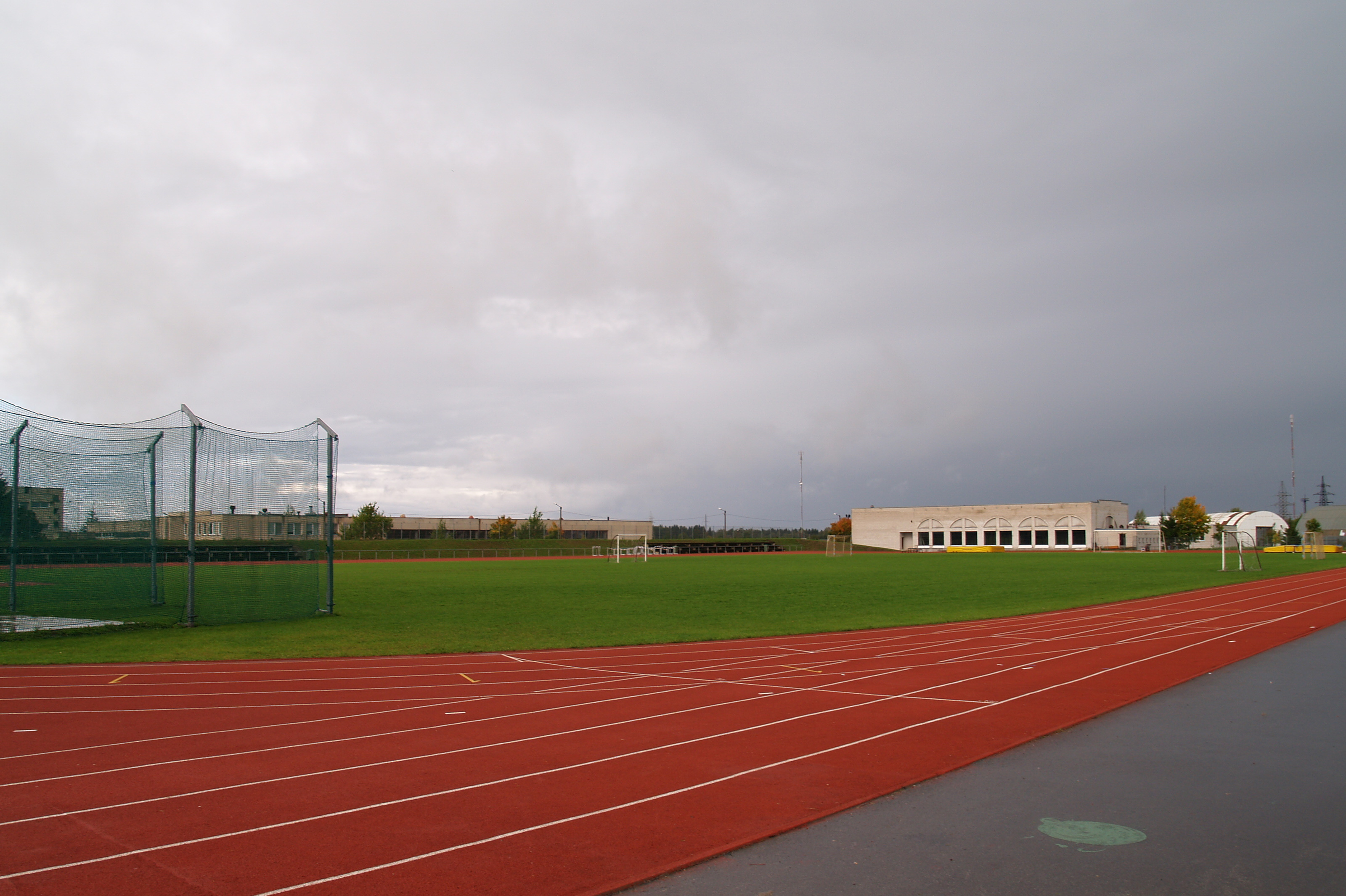 Kose Gümnaasiumi staadion. Taamal paistab Kose ujula.